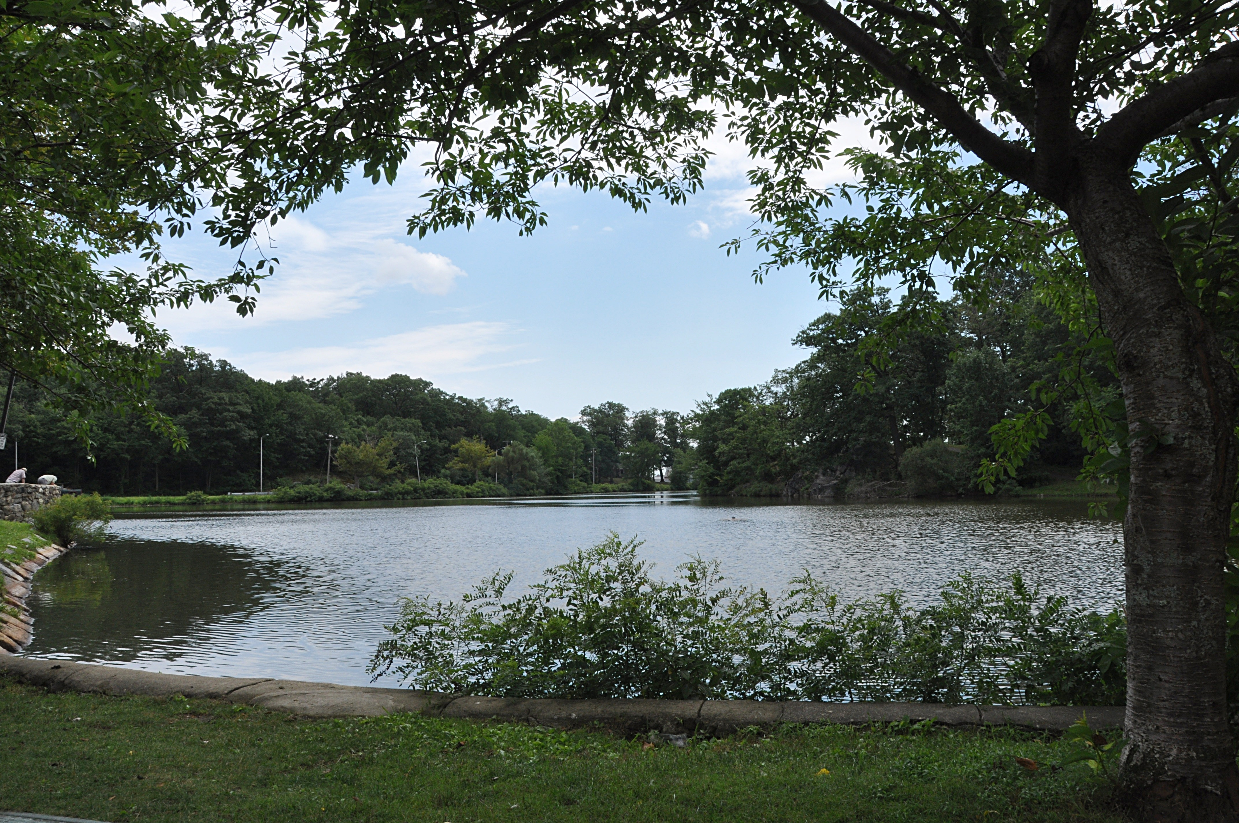 Fellsmere Pond, in Fellsmere Park, Malden, Massachusetts.